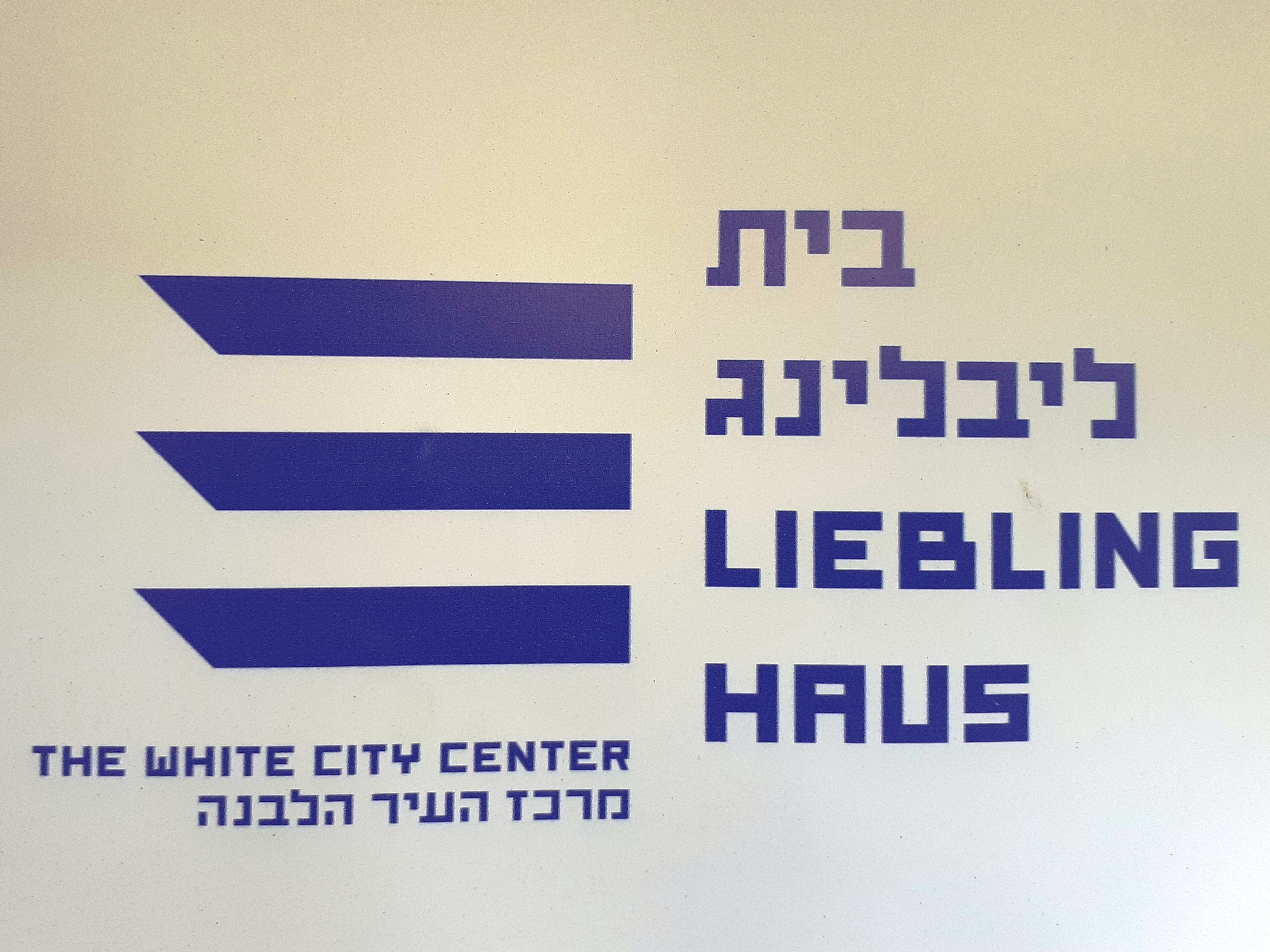 Logo des Beit Liebling (בֵּית לִיבְּלִינְג) / Lieblinghaus in Tel Aviv